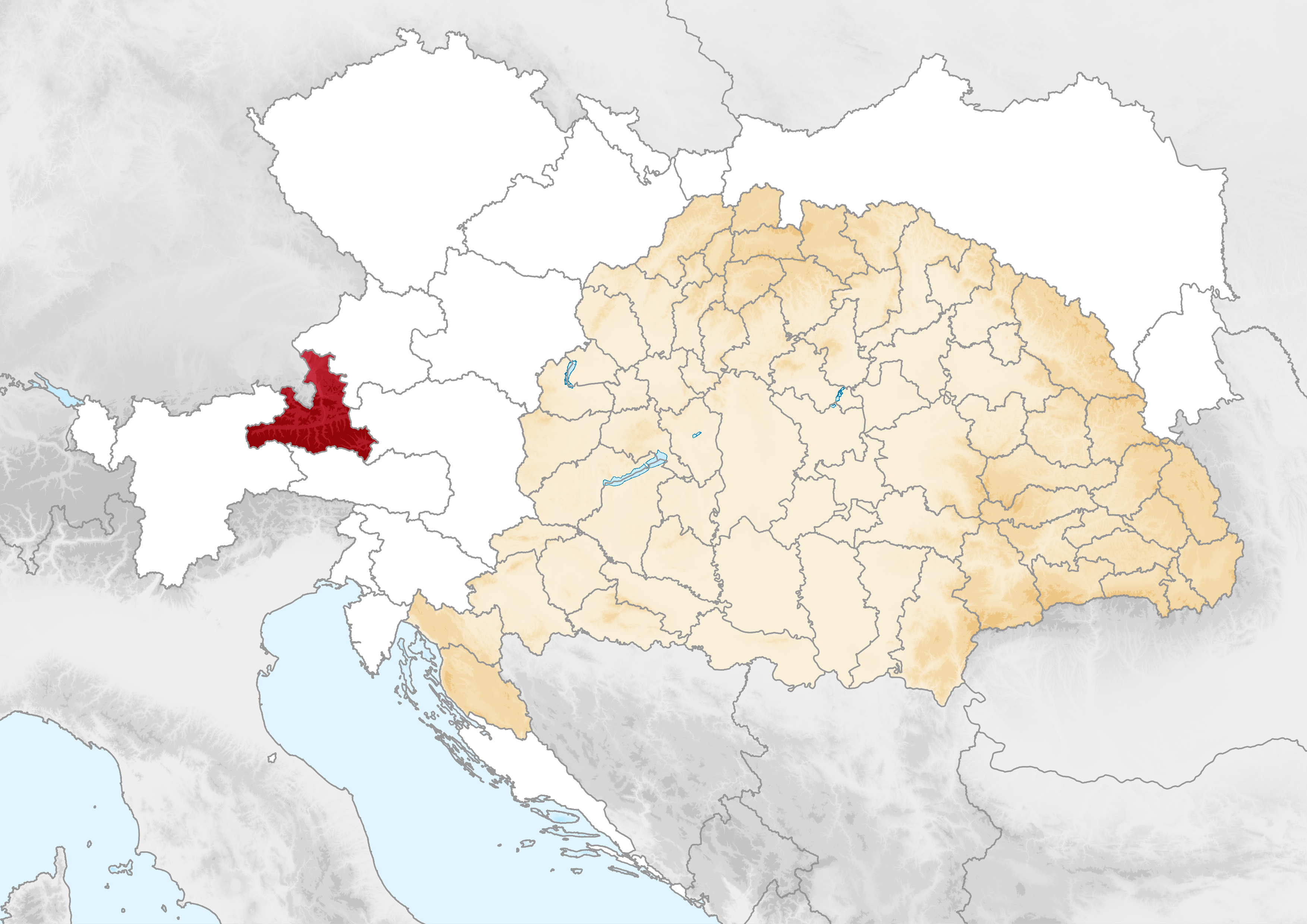 Carte du Salzbourg en 1914